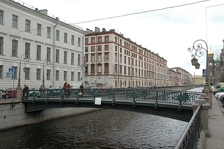 Italian (Italianskii) bridge. St Petersburg, Griboedova channel.